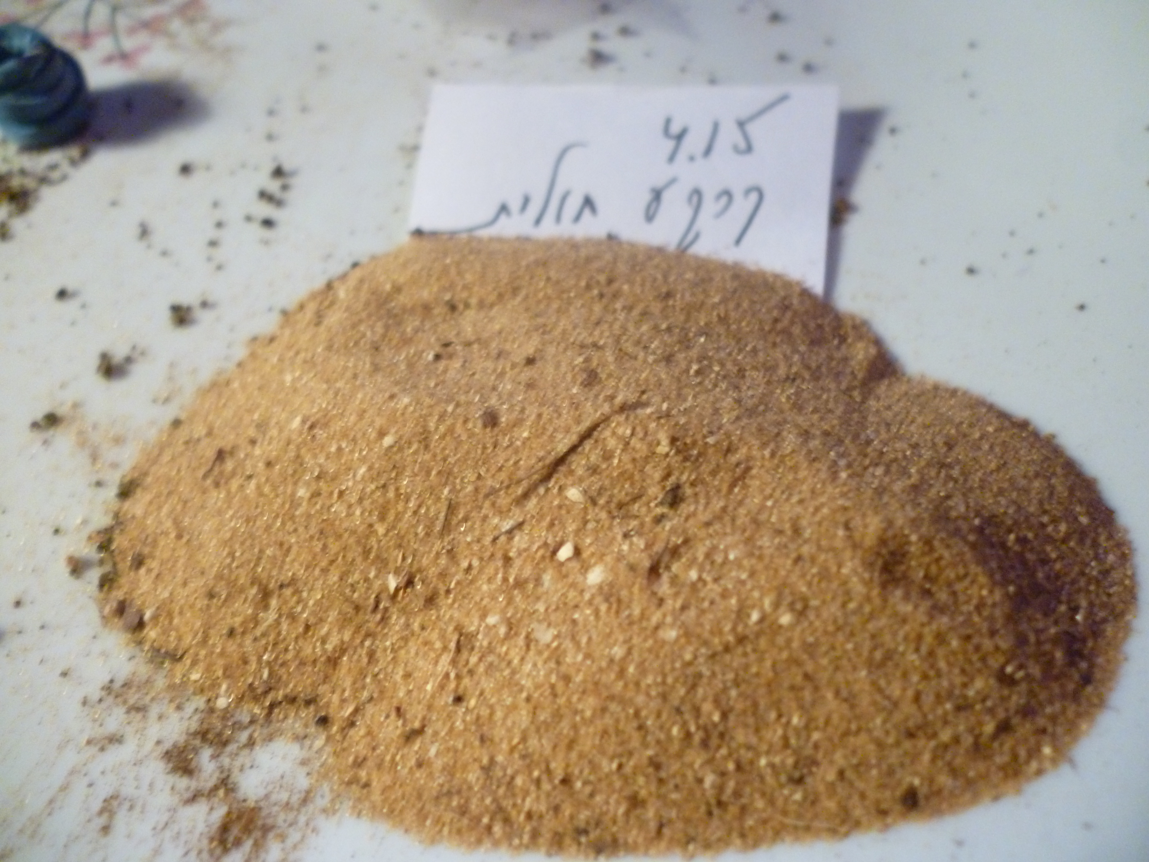 אדמת חול